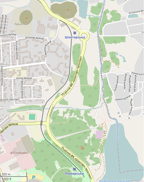 частина мапи міста Донецьк на OpenStreetMap з Донецькою дитячою залізницею